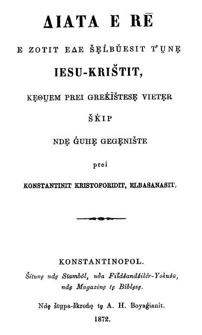 Titel d. Neuen Testaments in albanischer Sprache